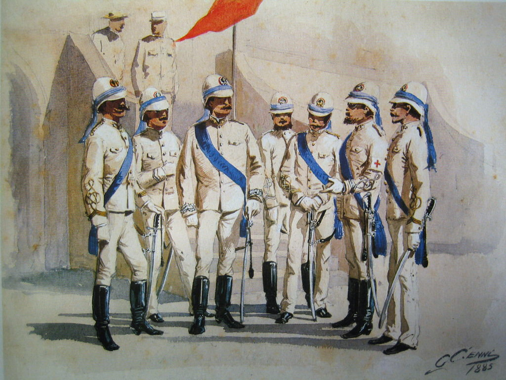 Officiers italiens en Afrique, 1885.